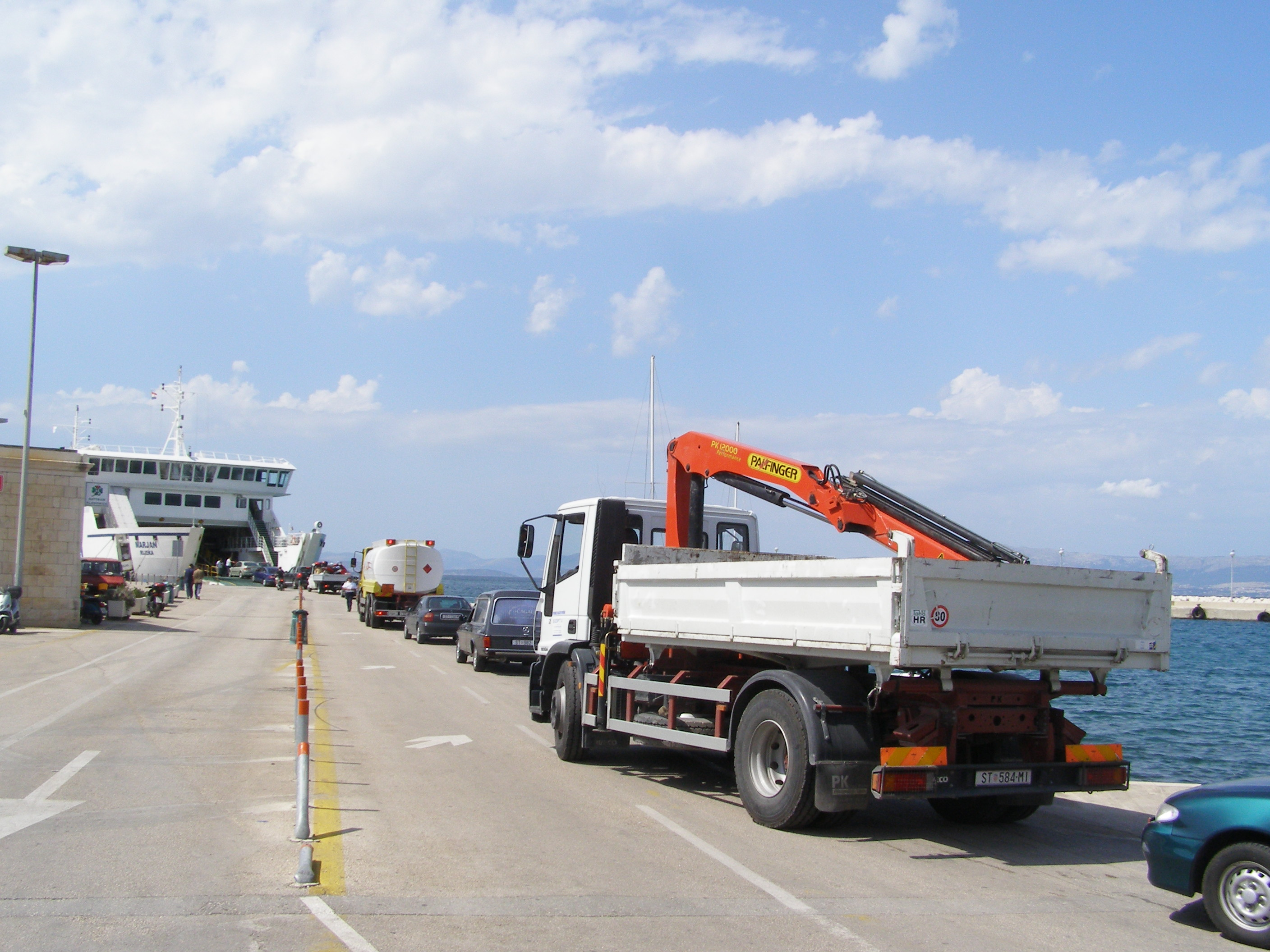 Supetar harbour